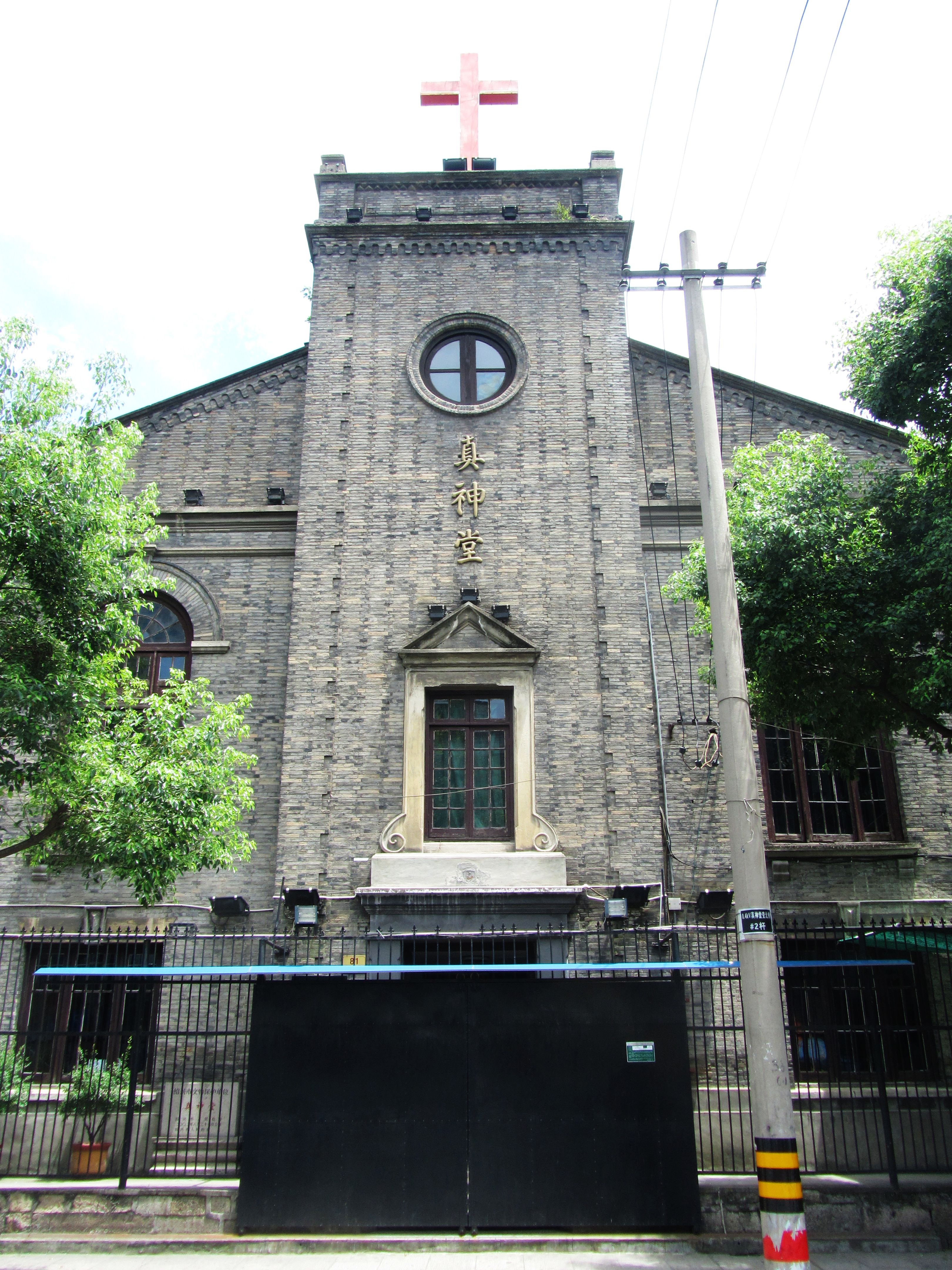 绍兴市越城区东街81号真神堂。